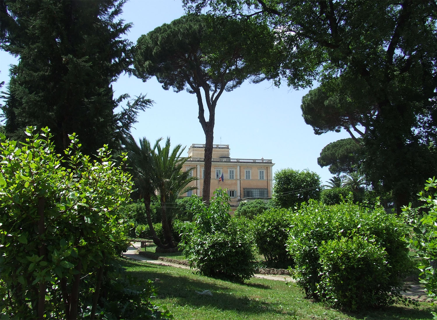 Villa Celimontana, Roma - giardini, sullo sfondo palazzetto Mattei